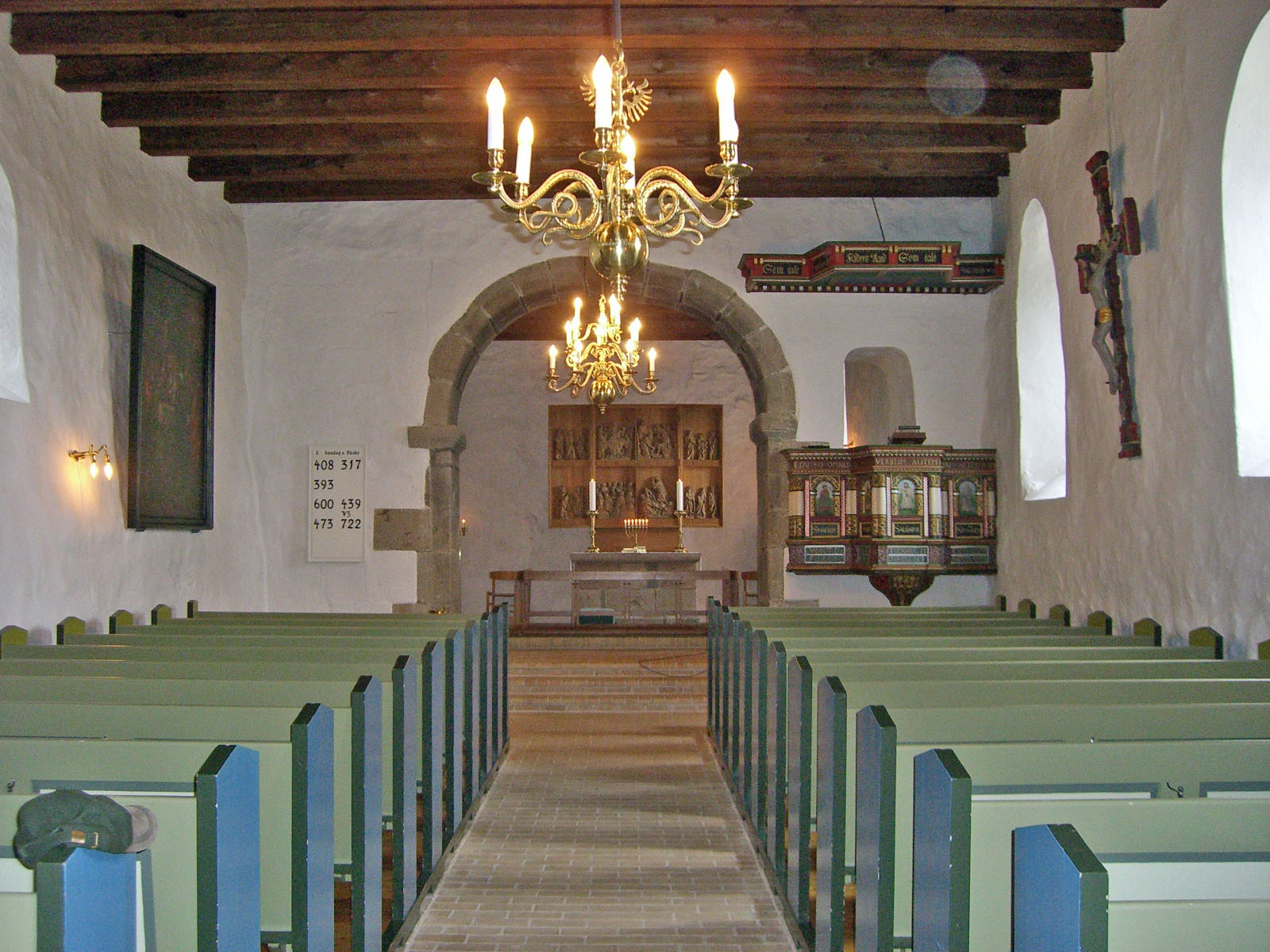 Serritslev Kirke